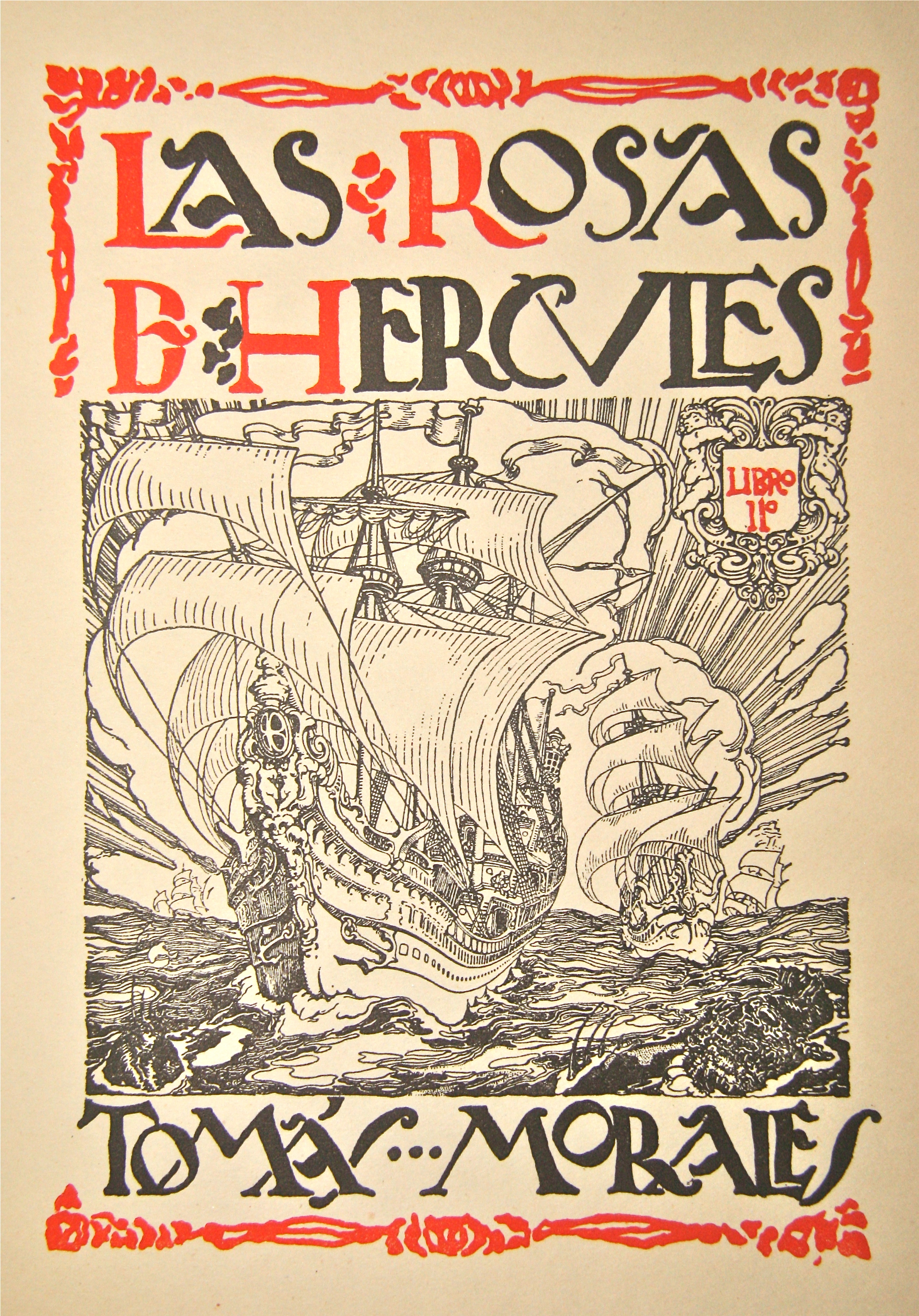 Fotografía de elaboración propia sobre una portada de libro de 1919 en dominio público